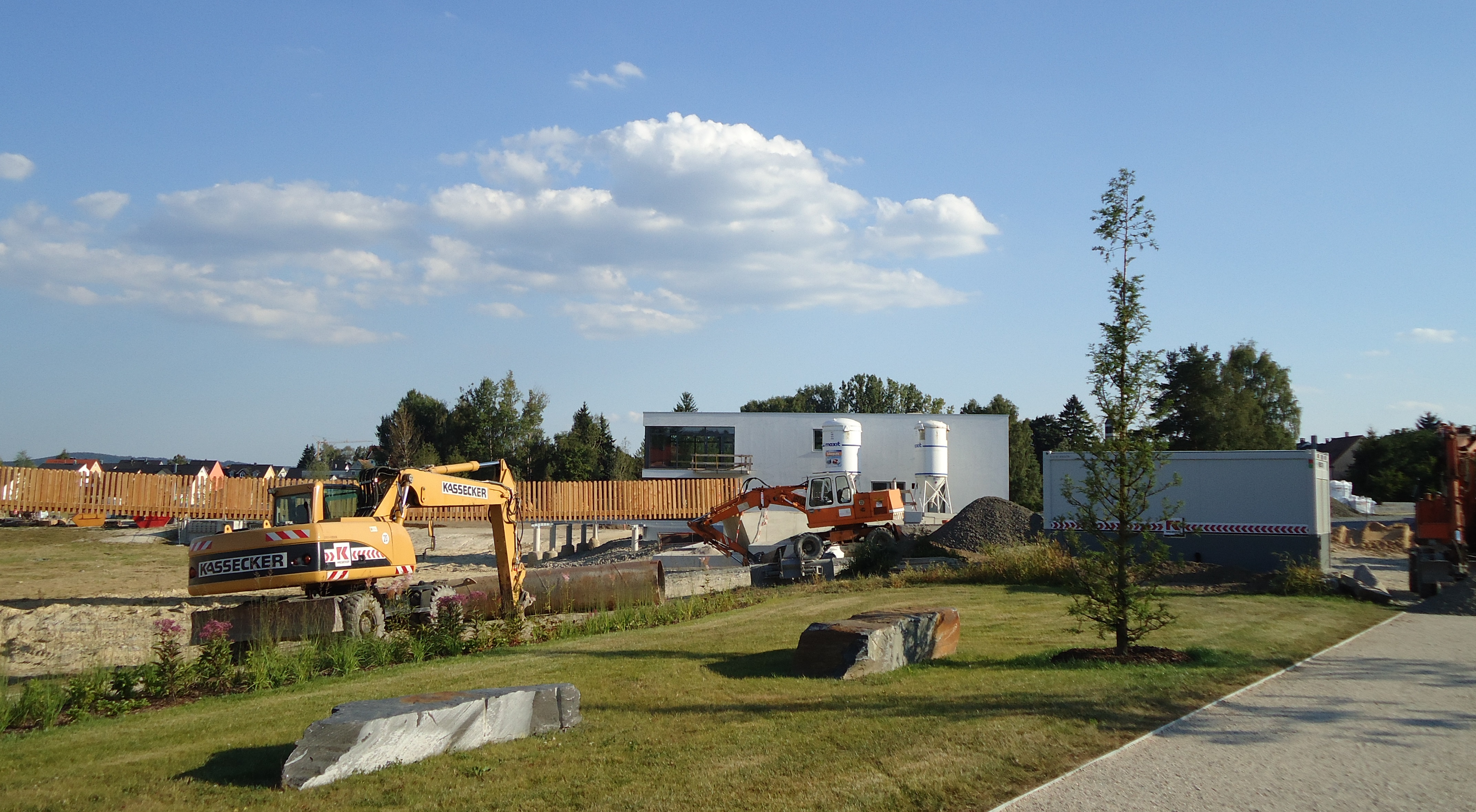 Bauarbeiten Landesgartenschau Tirschenreuth 2013